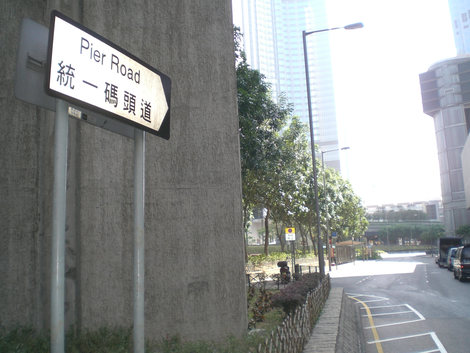 近中環碼頭的前統一碼頭, 現址餘下有一個路牌, 街名為統一碼頭道, Pier Road, Central, Hong Kong